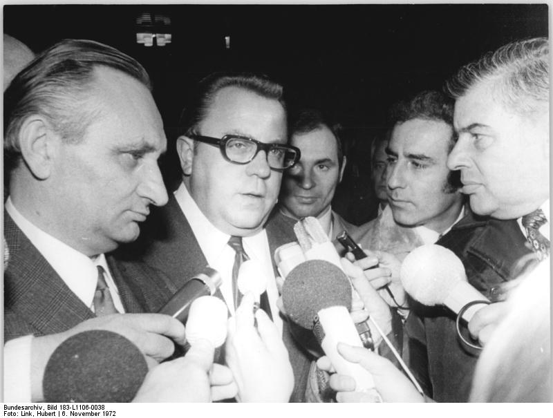 ADN-ZB Link-6.11.72 Berlin: Verhandlungen Kohl-Bahr beendet- Der Staatssekretär beim Ministerrat der DDR, Dr. Michael Kohl, und der Staatssekretär im Bundeskanzleramt der BRD, Egon Bahr, beendeten in Begleitung ihrer Delegation am 6. November 72 die Verhandlungen zu einem Vertrag über die Beziehungen zwischen der Deutschen Demokratischen Republik und der Bundesrepublik Deutschland. Unser Foto: Im Anschluß an die Verhandlungen beantworteten Dr. Michael Kohl (2.v.l.) und Egon Bahr (l) Fragen von Journalisten.